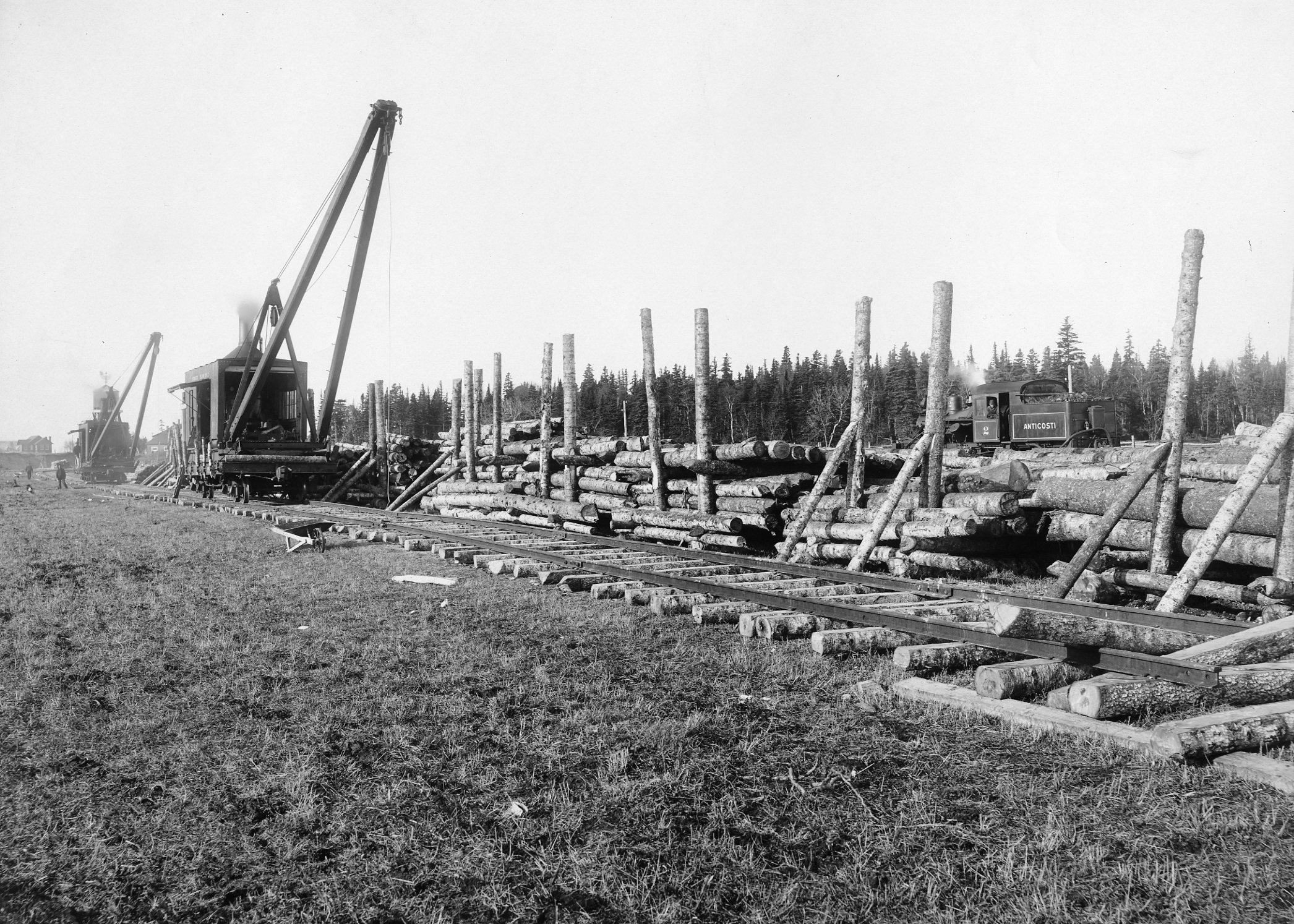 Image de la région du Saguenay, au Québec, tirée du fonds Famille Dubuc et sélectionnée par BAnQ Saguenay.